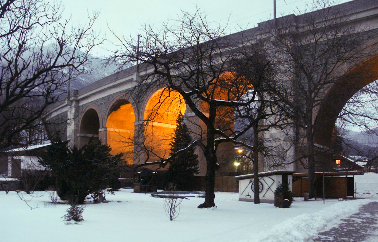 Abendansicht des Semmeringbahn-Viaduktes in Payerbach.